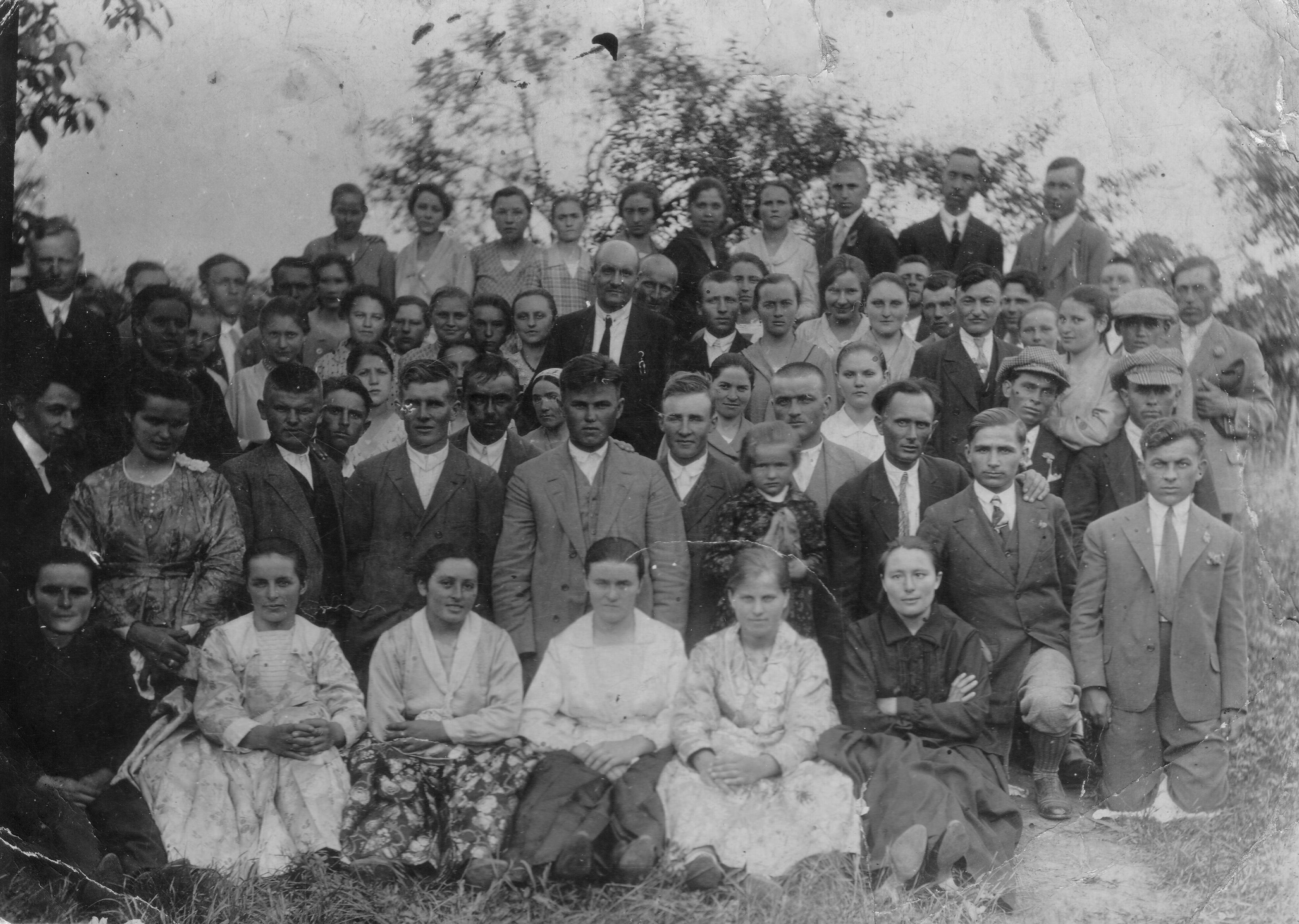 Výlet komlóšanov na Čabu